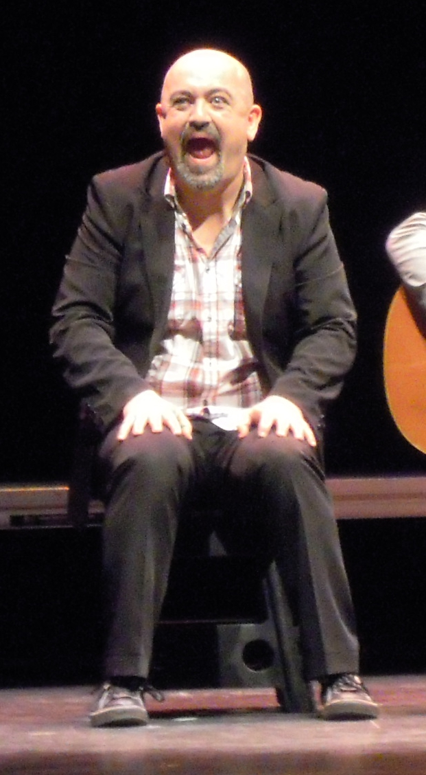 César Goldi na representación da obra "Life is a paripé" no Pazo da Cultura de Pontevedra